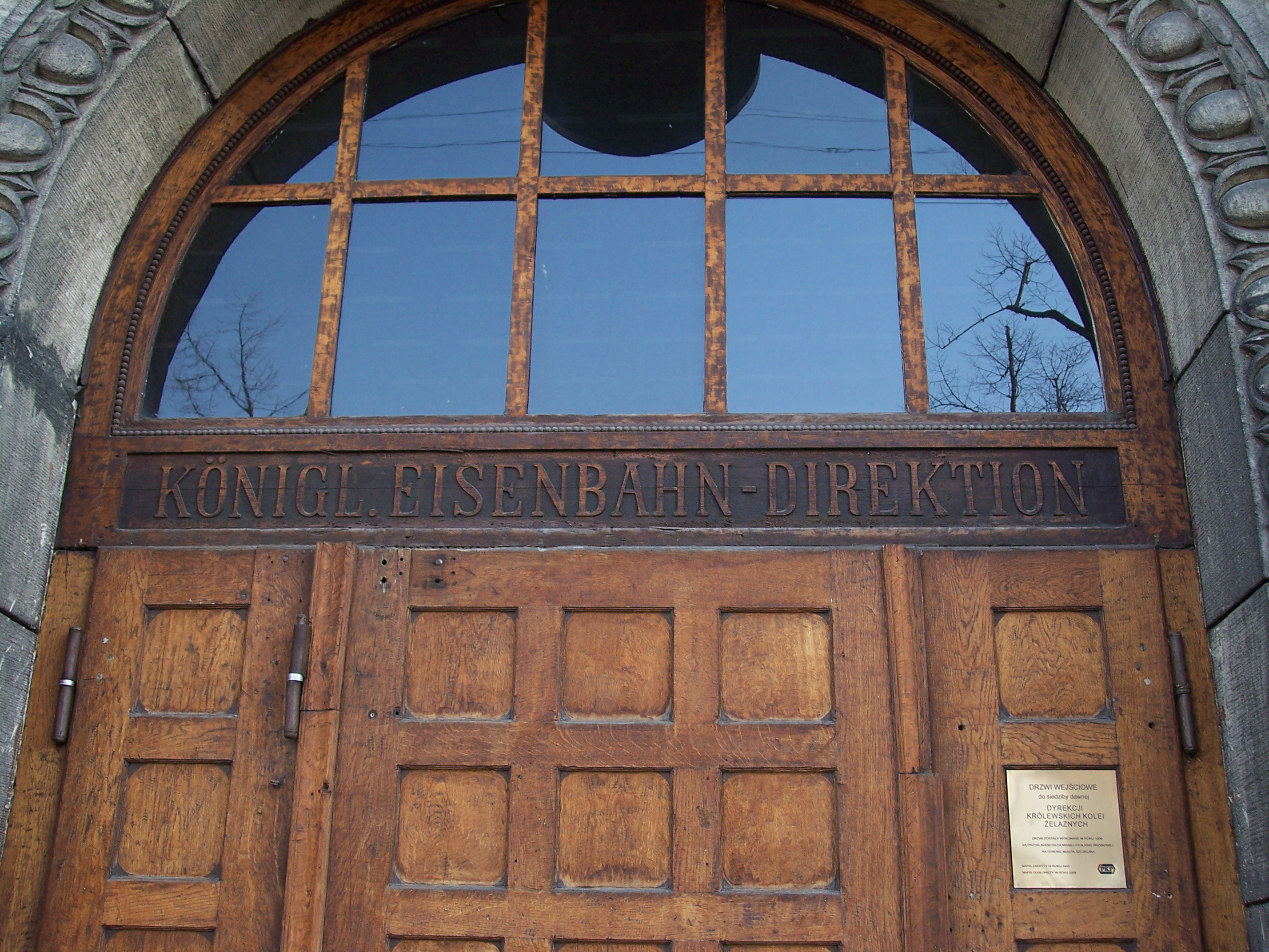 Eingangstür zur kgl. Eisenbahn-Direktion Stettin, ul. Korzeniowskiego 1 (ehem. Karlstr.)